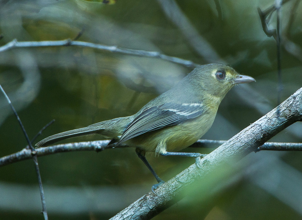 Cuban Vireo - Cuba_S4E0897